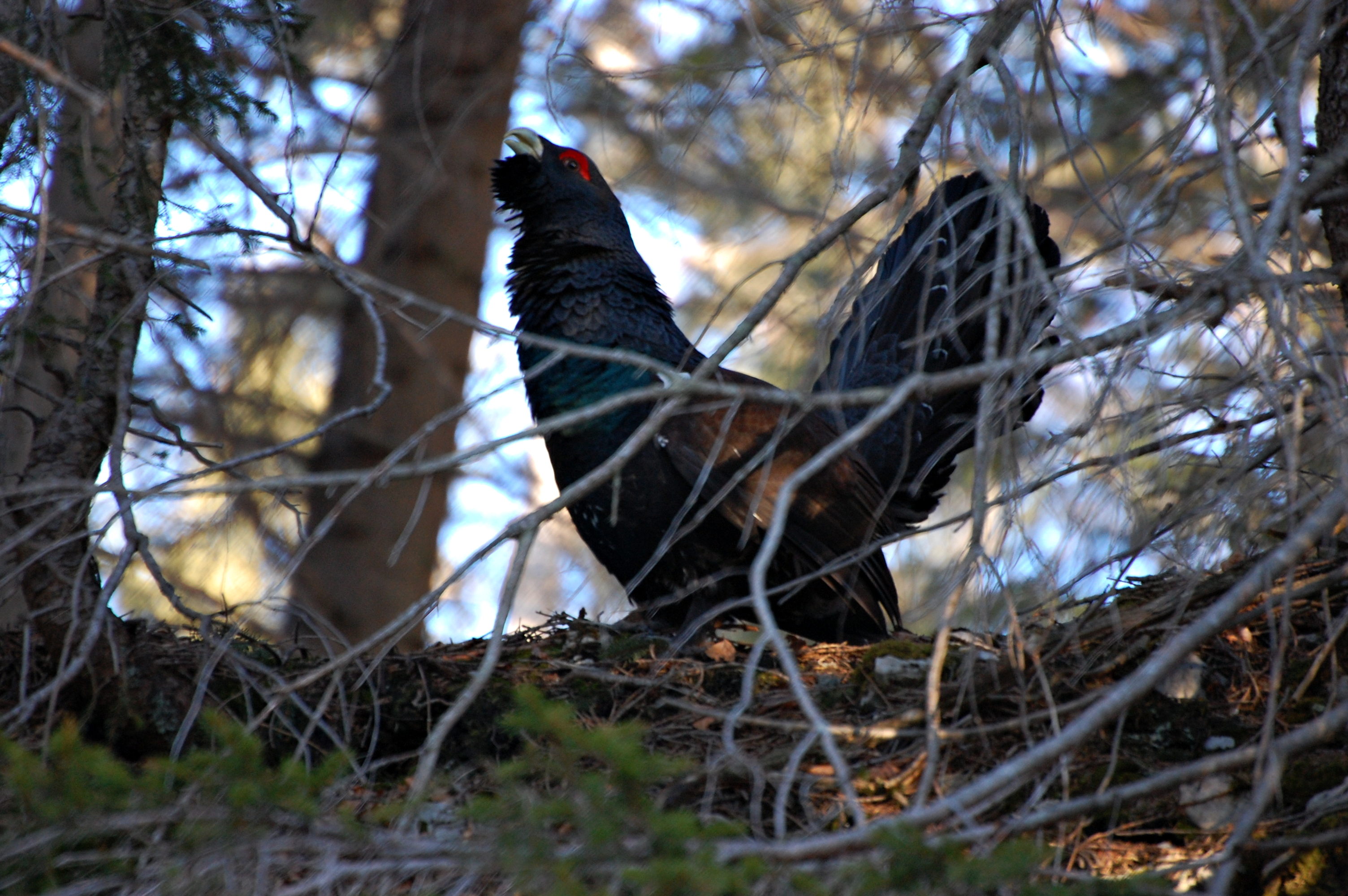 balzender Auerhahn, der sein Revier verteidigt.